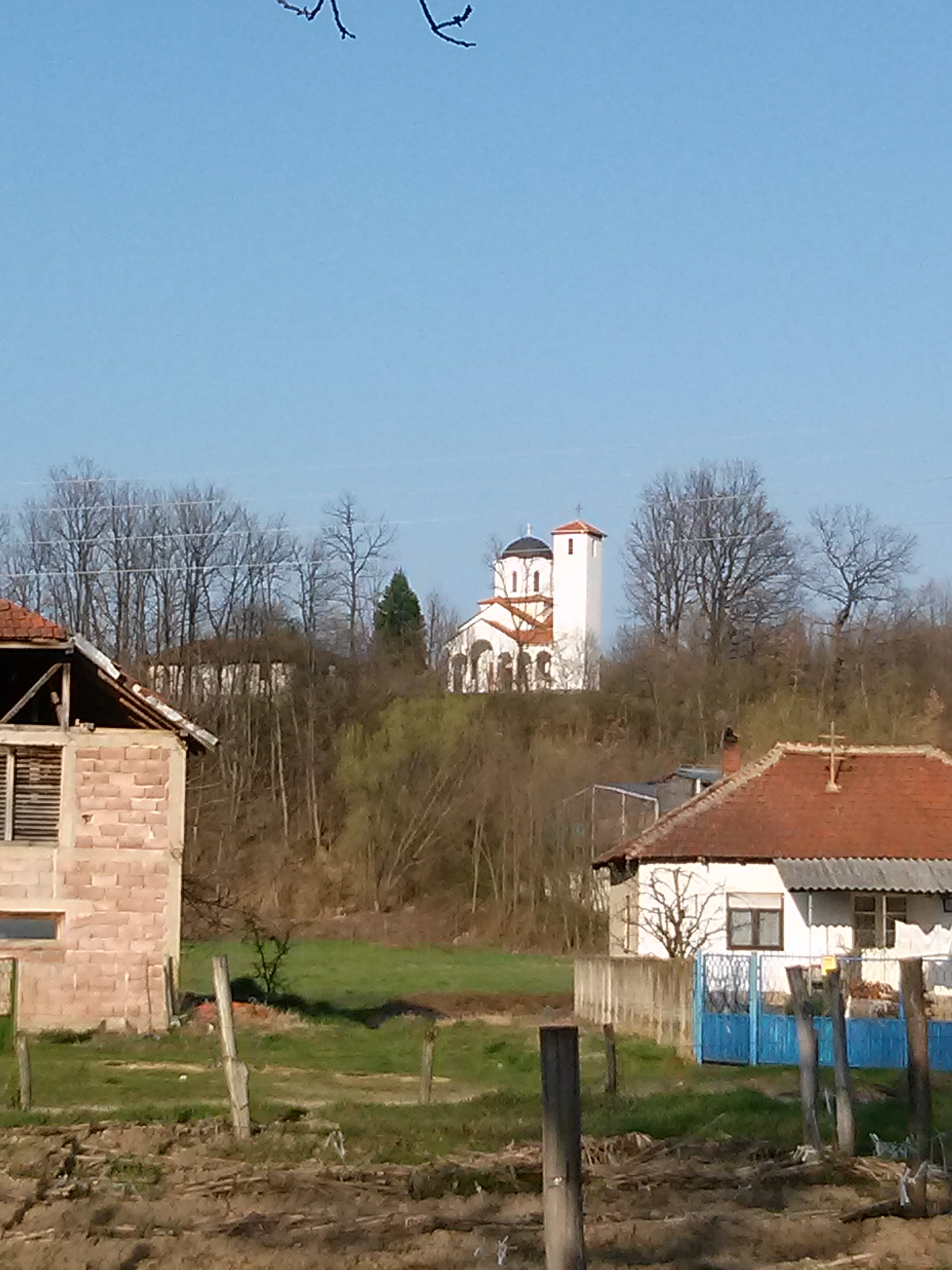 Srpski (latinica): Crkva Svetog Arhangela Gavrila, Nakrivanjski Čifluk, zaselak sela Nakrivanj